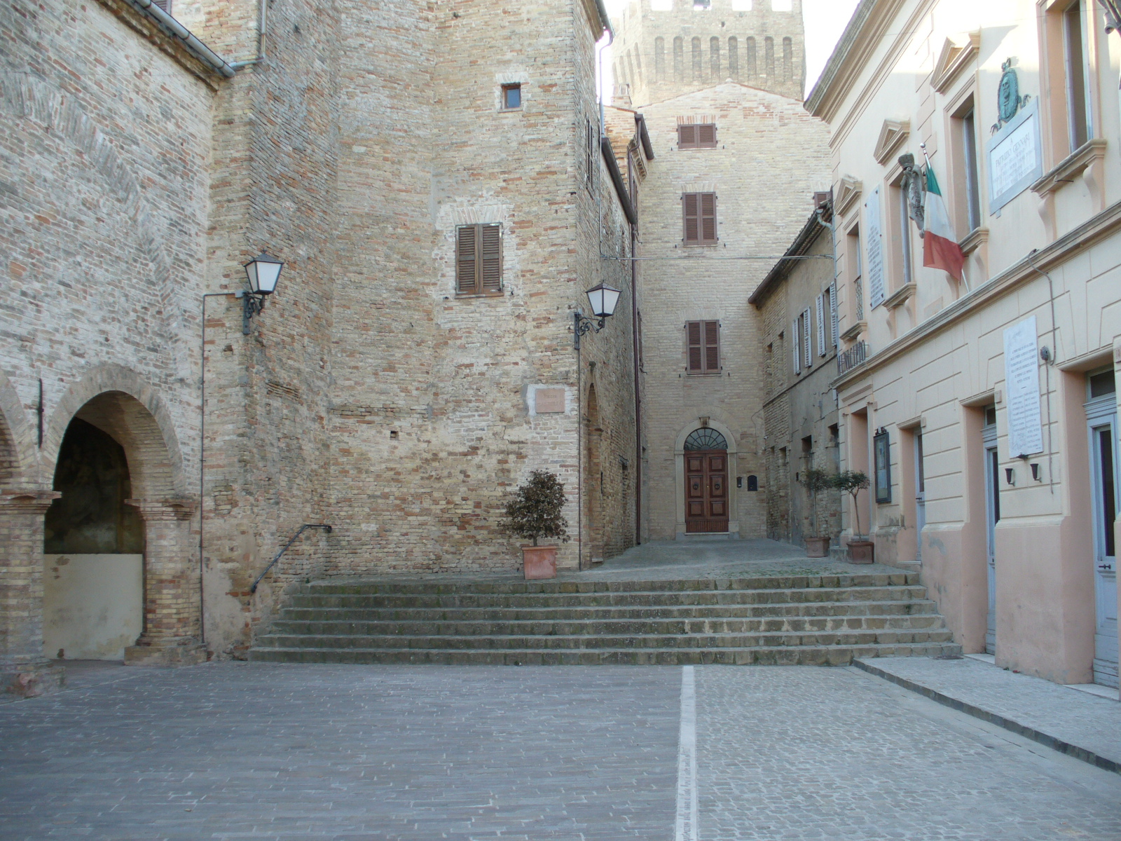 Piazza di Moresco.Moresco, Piazza Castello